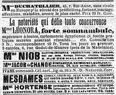 Divination. Annonces publicitaires de différentes "somnanbules" parues dans "Le Petit Journal" (France) du 1er octobre 1894